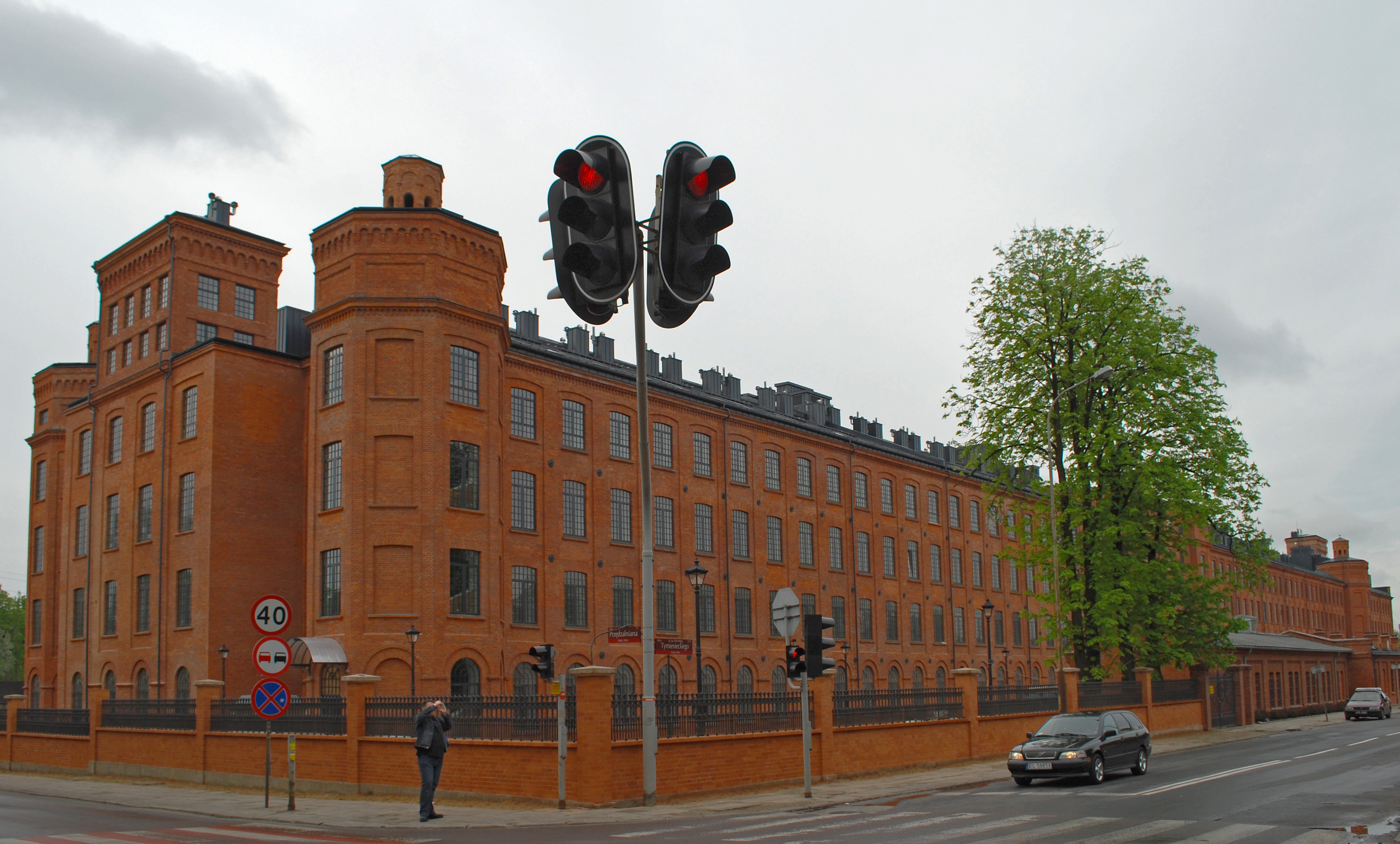 Fabaryka Karola Scheiblera z rogu Przędzelnianej i Tymienieckiego - widok na lofty.